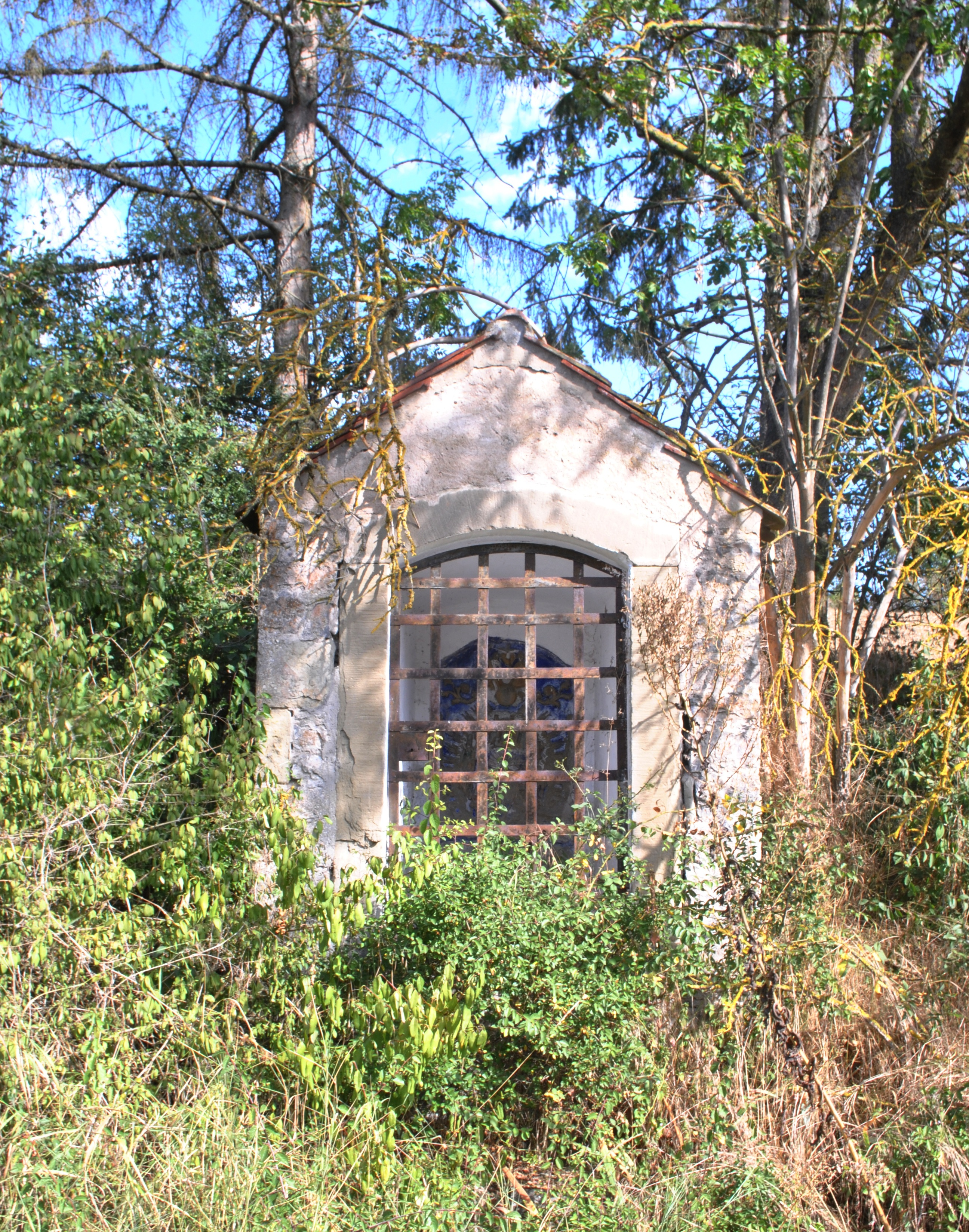 Votivkapelle Dettelbach-Hellersmühle, Kapellennische Mit den Vierzehn Nothelfern und der Dreifaltigkeit, kleiner Massivbau mit Satteldach, erste Hälfte 19. JahrhundertThis is a photograph of an architectural monument.